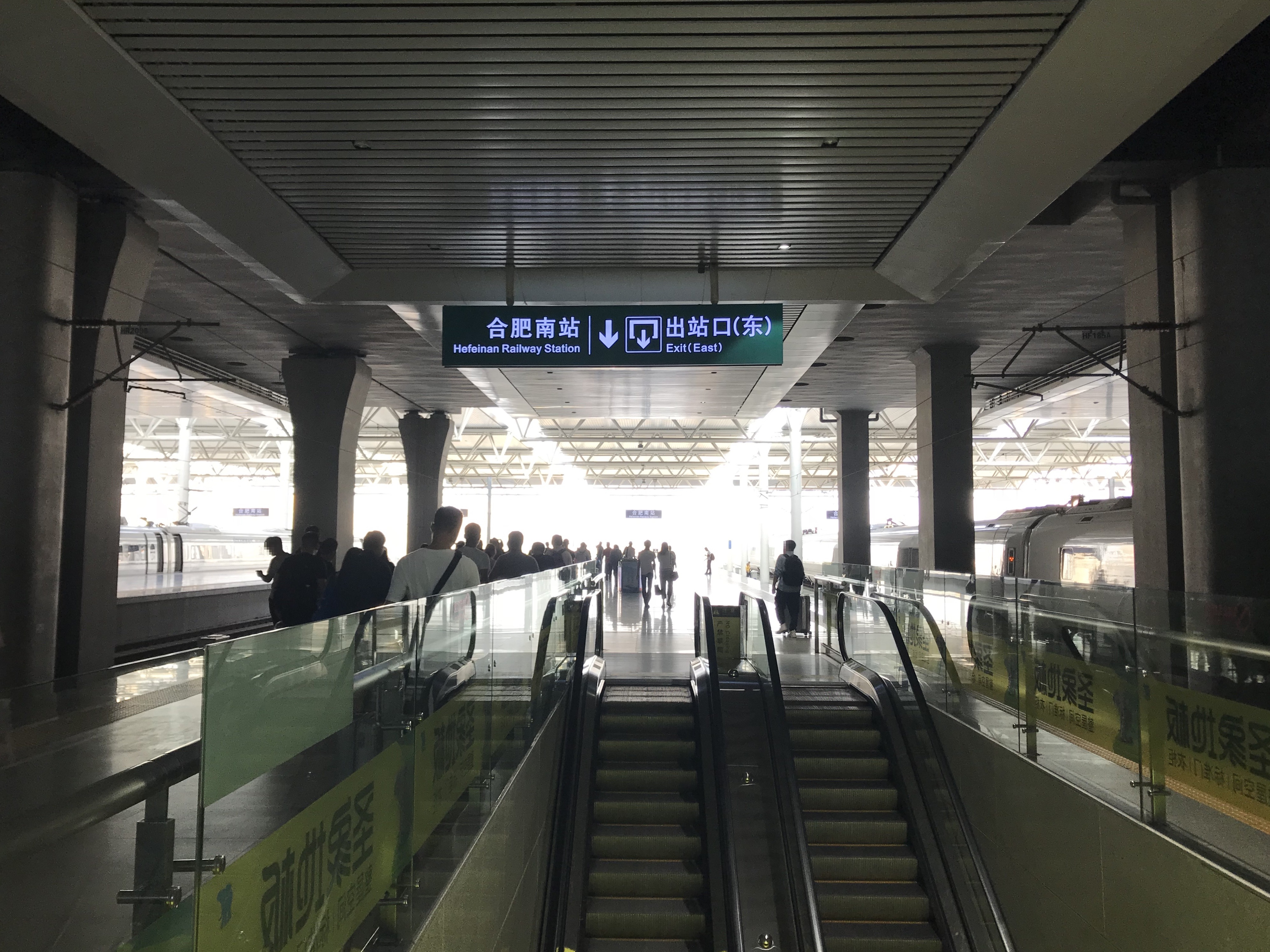 合肥南駅のホーム